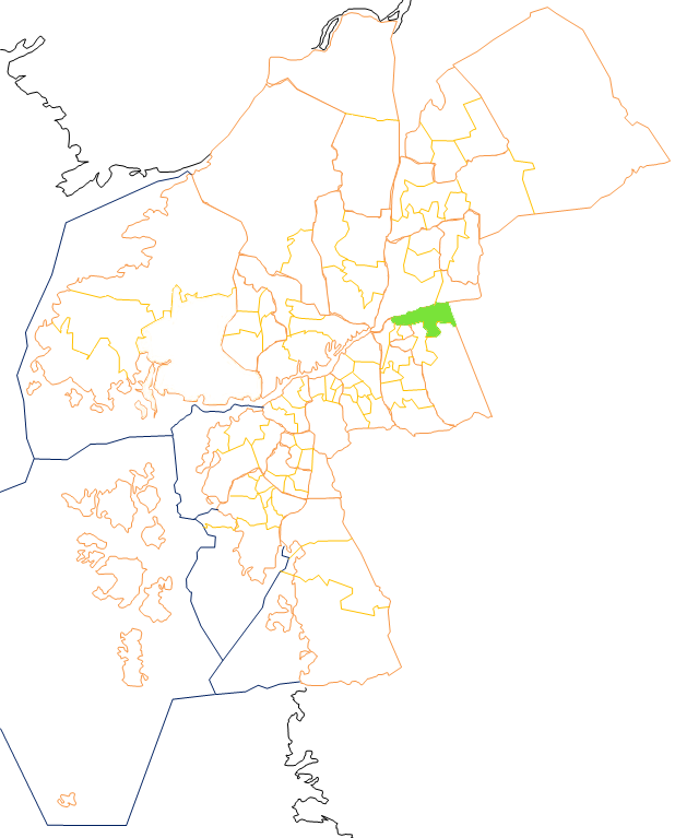 Karta som visar primärområdes belägenhet i Göteborg